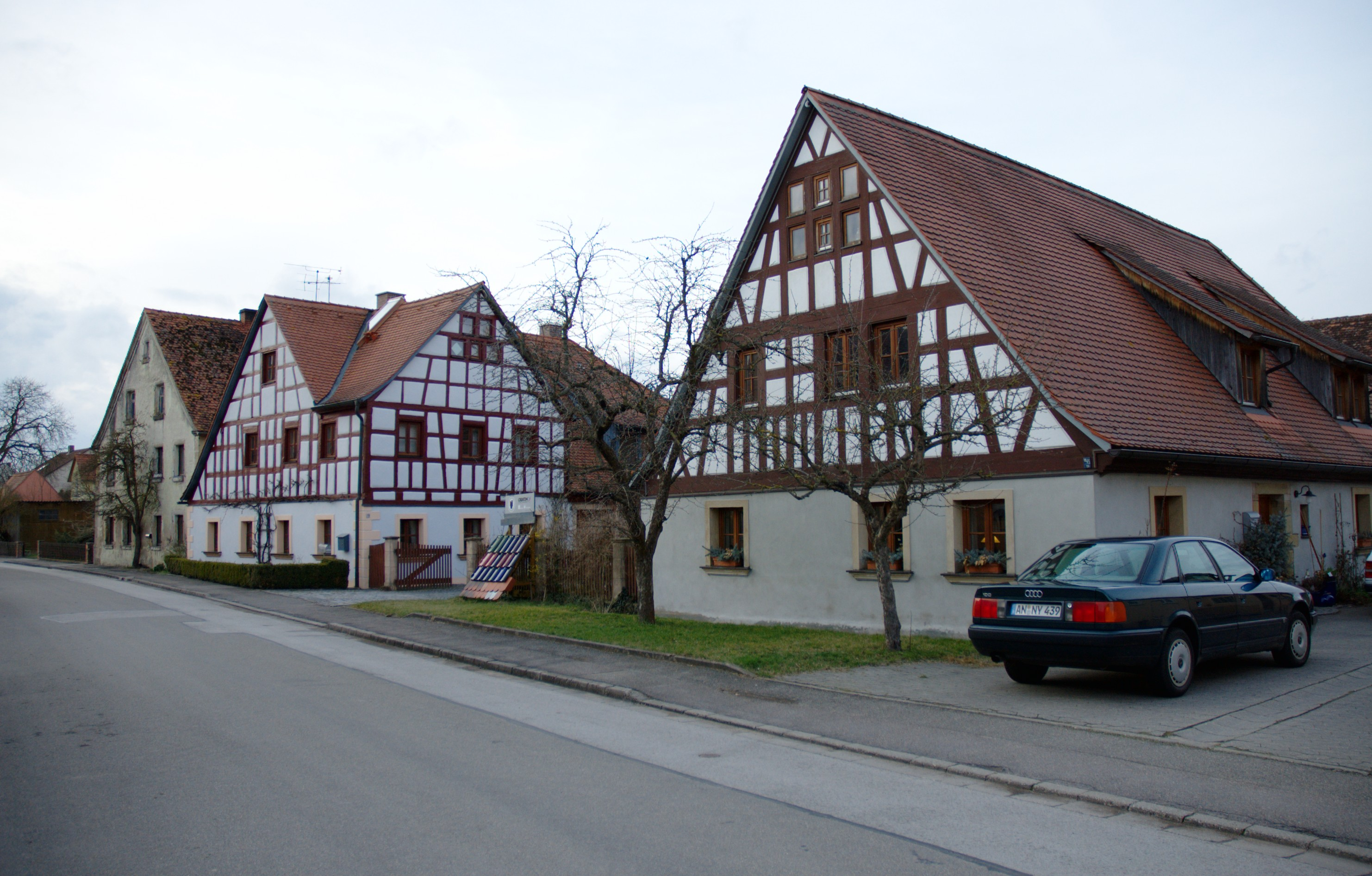 Zailach